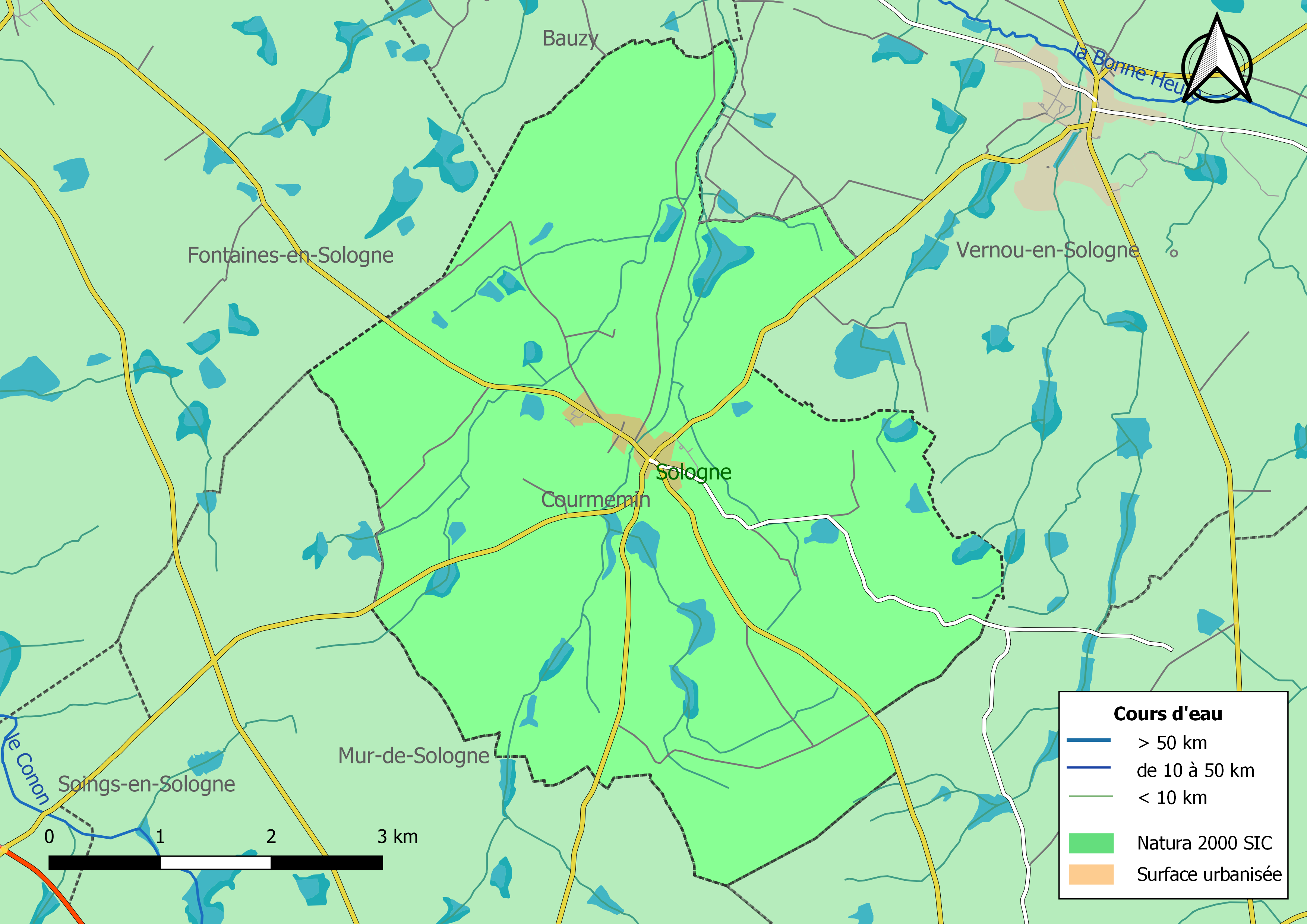 Zones Natura 2000 de type SIC de la commune de Courmemin (Loir-et-Cher, France).